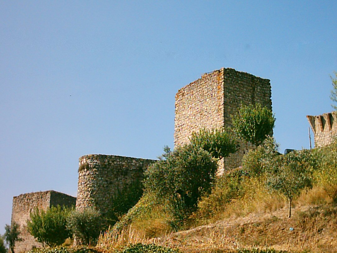 Castelo de Ourém, em Ourém (Portugal)